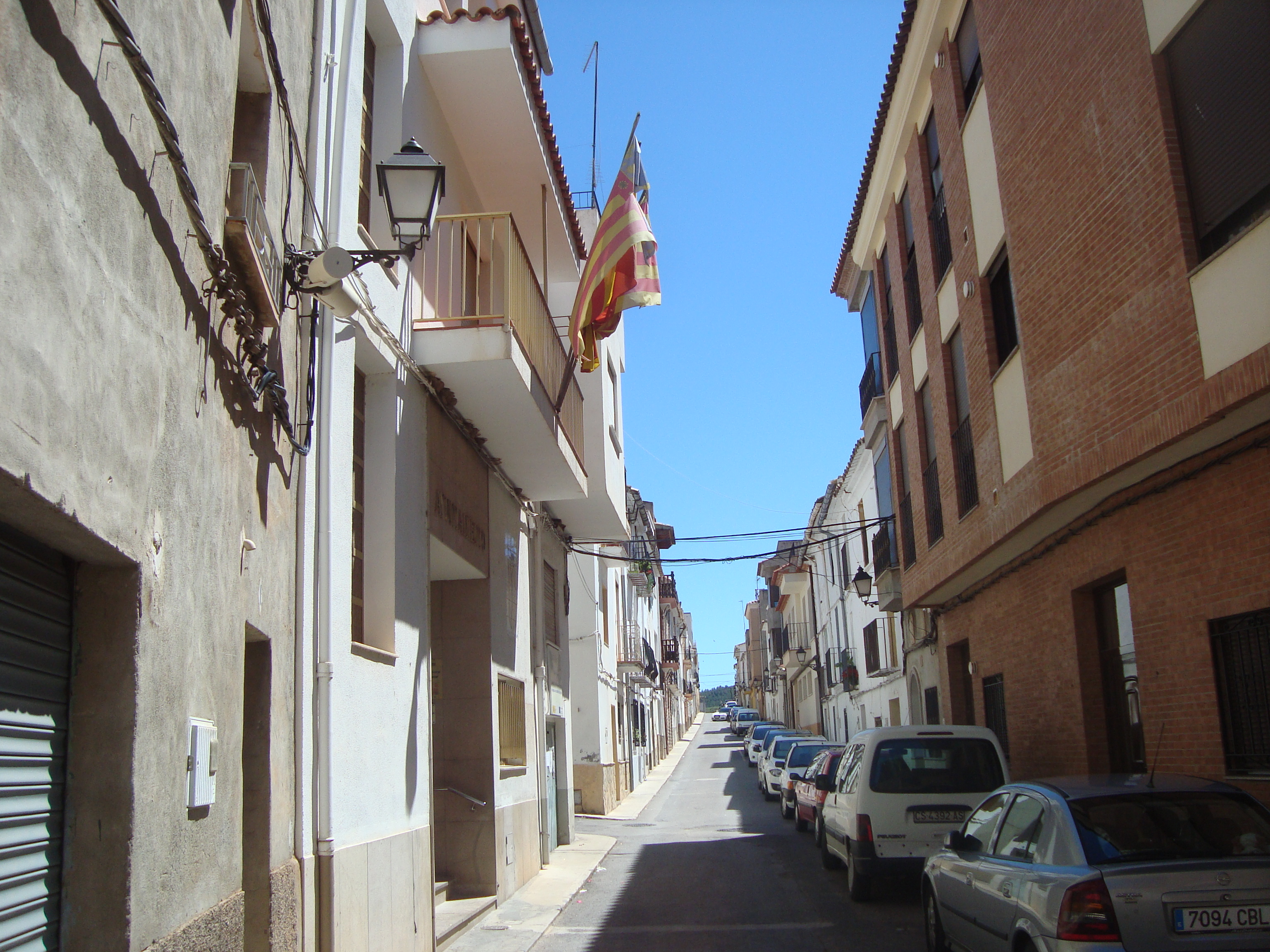 Calle de Figueroles